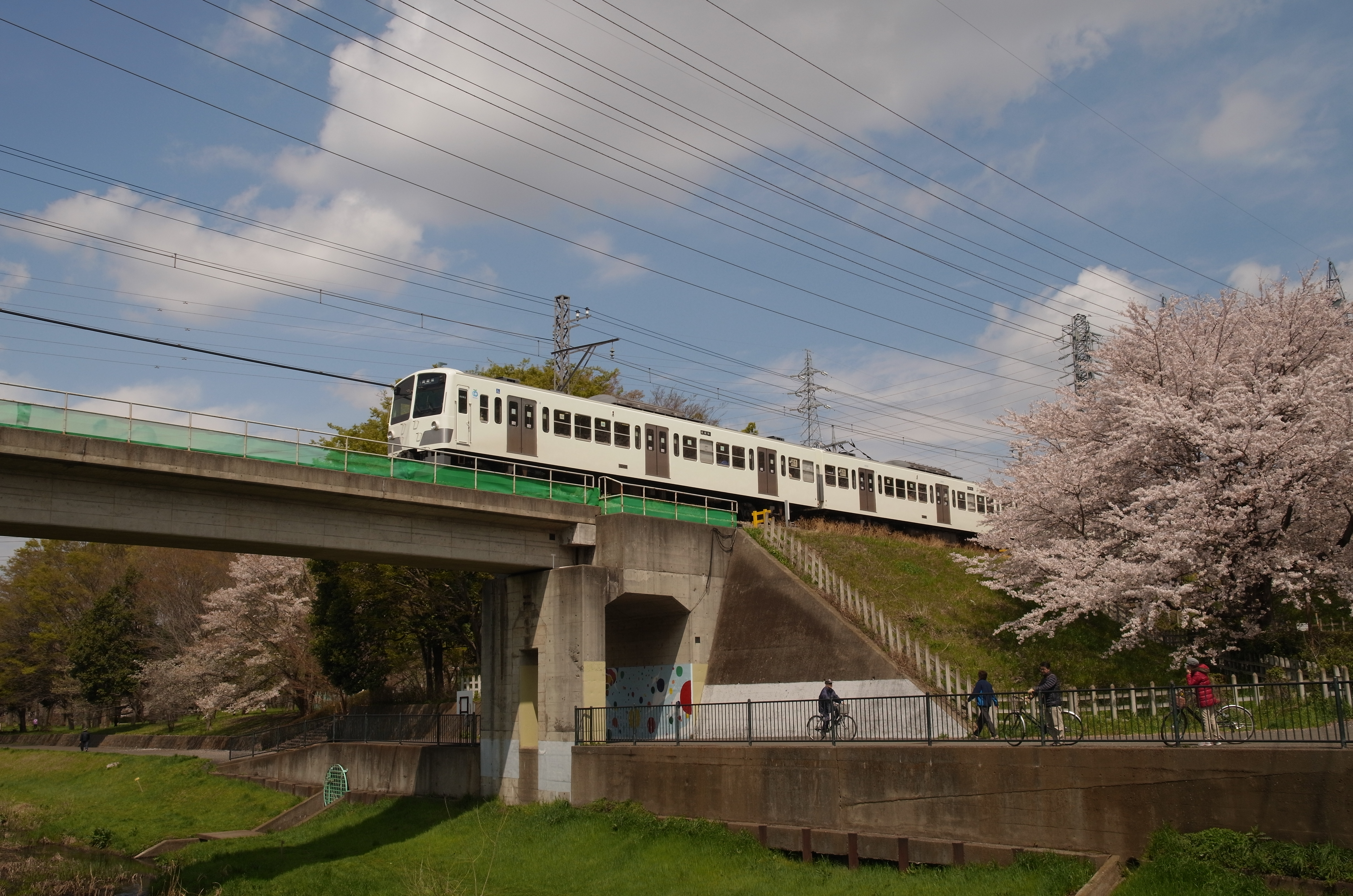 西武多摩川線二枚橋橋梁。橋の東側、二枚橋（道路橋）横から撮影。